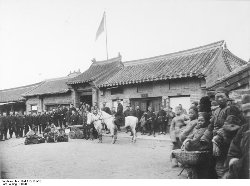 China 1898 Haupt-Yamen in Tsingtau.